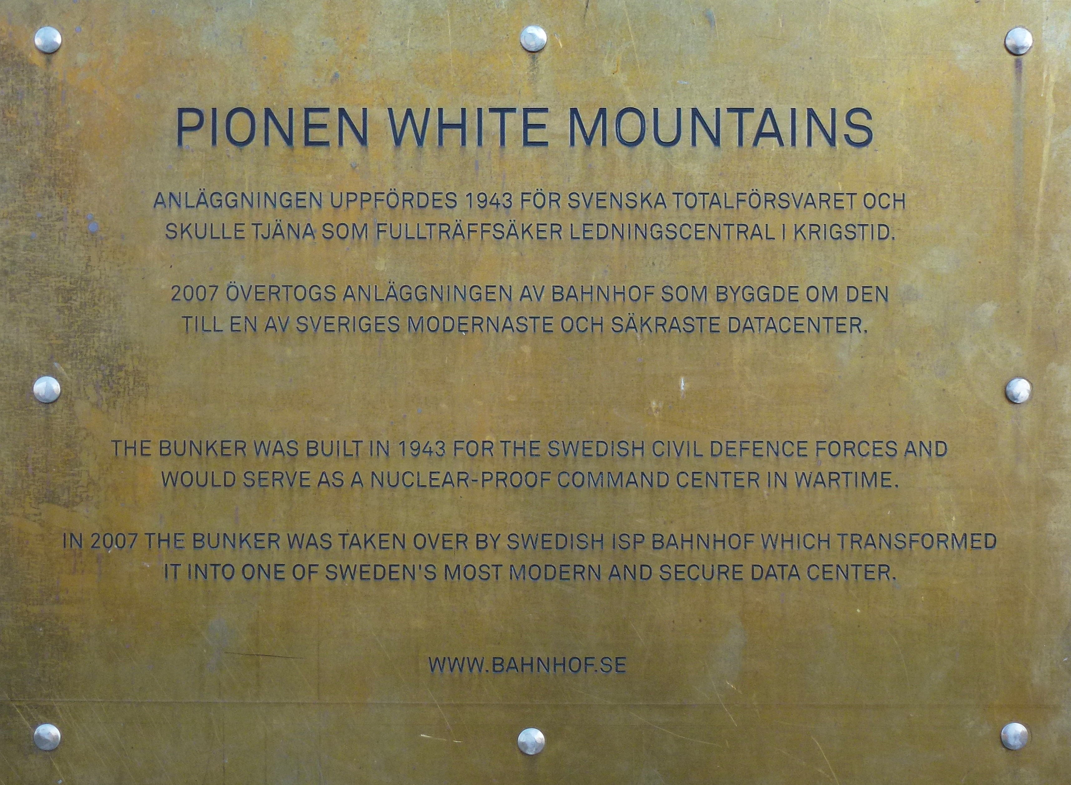 Pionen, tidigare skyddsrum och ledningscentral, numera plats för Bahnhofs datahall